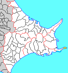 北海道花咲郡の位置（本土側のみ）。